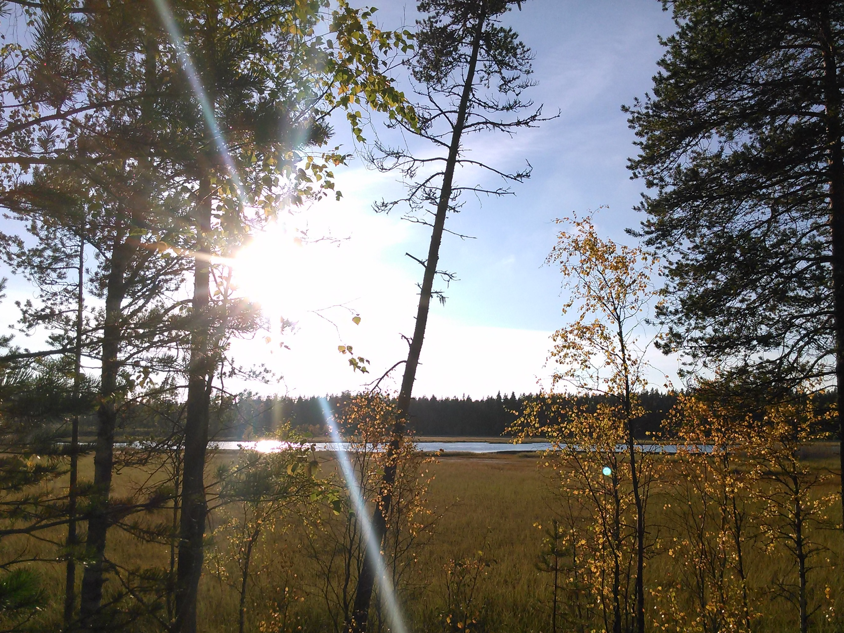 Holmsjön på Holmsjömyran utanför Umeå.